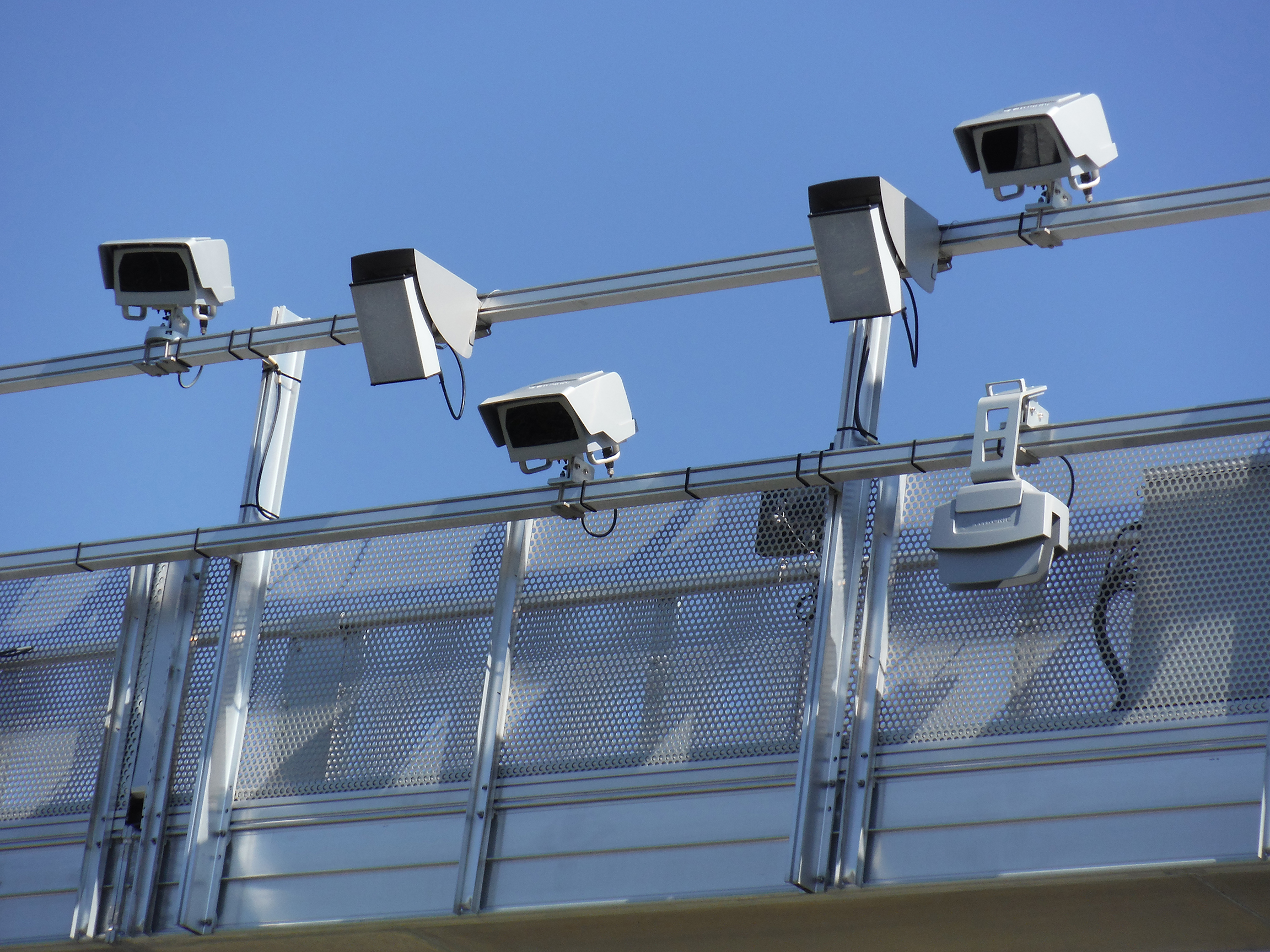 Portique Écotaxe. Coordonnées GPS : 45.5029 -0.119369